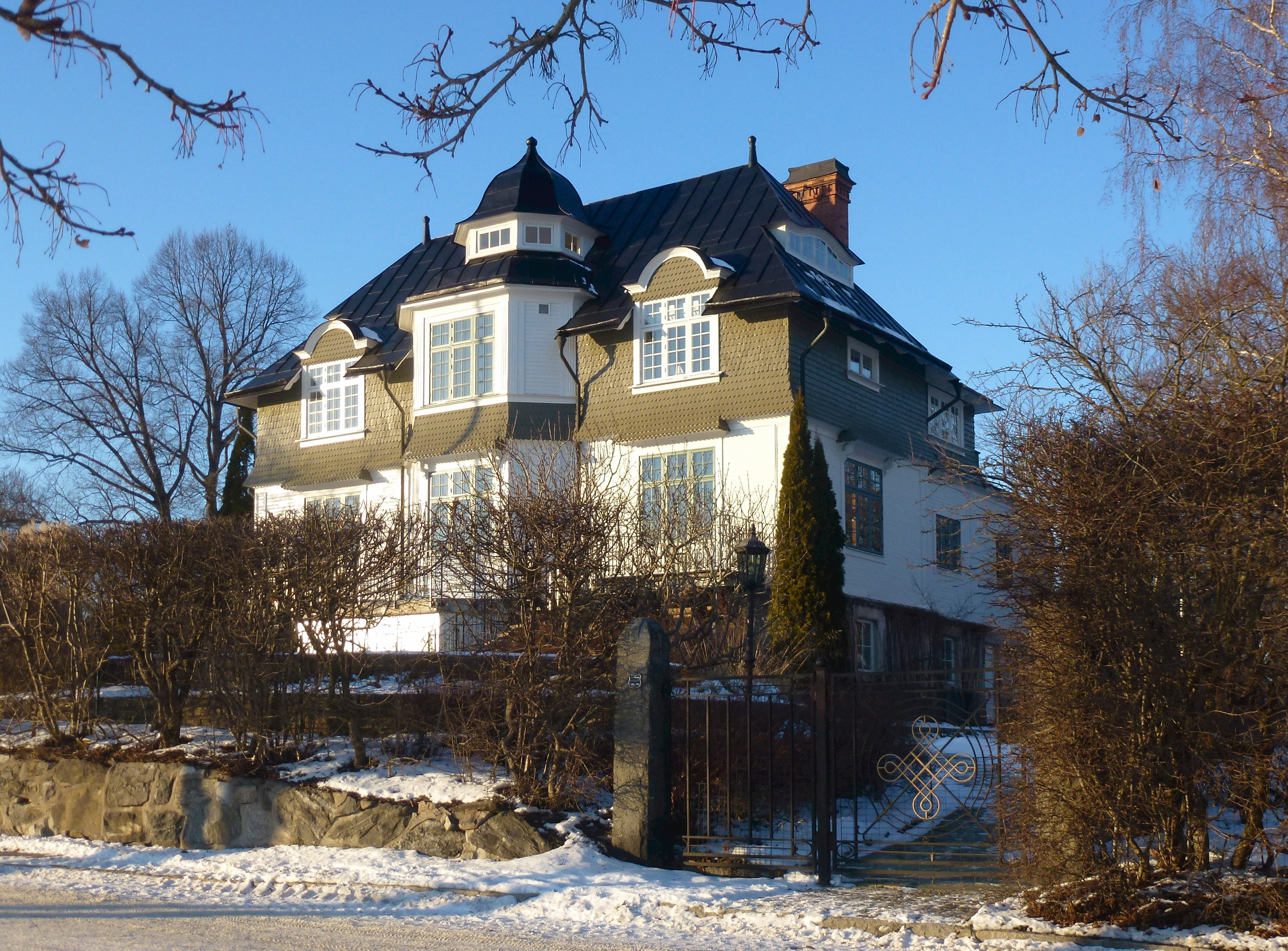 "Villa Solgårda" Djursholm, Strandvägen 11, arkitekt Hjalmar Andersson (efter 1904 Hjalmar Arwin 1871-1927)